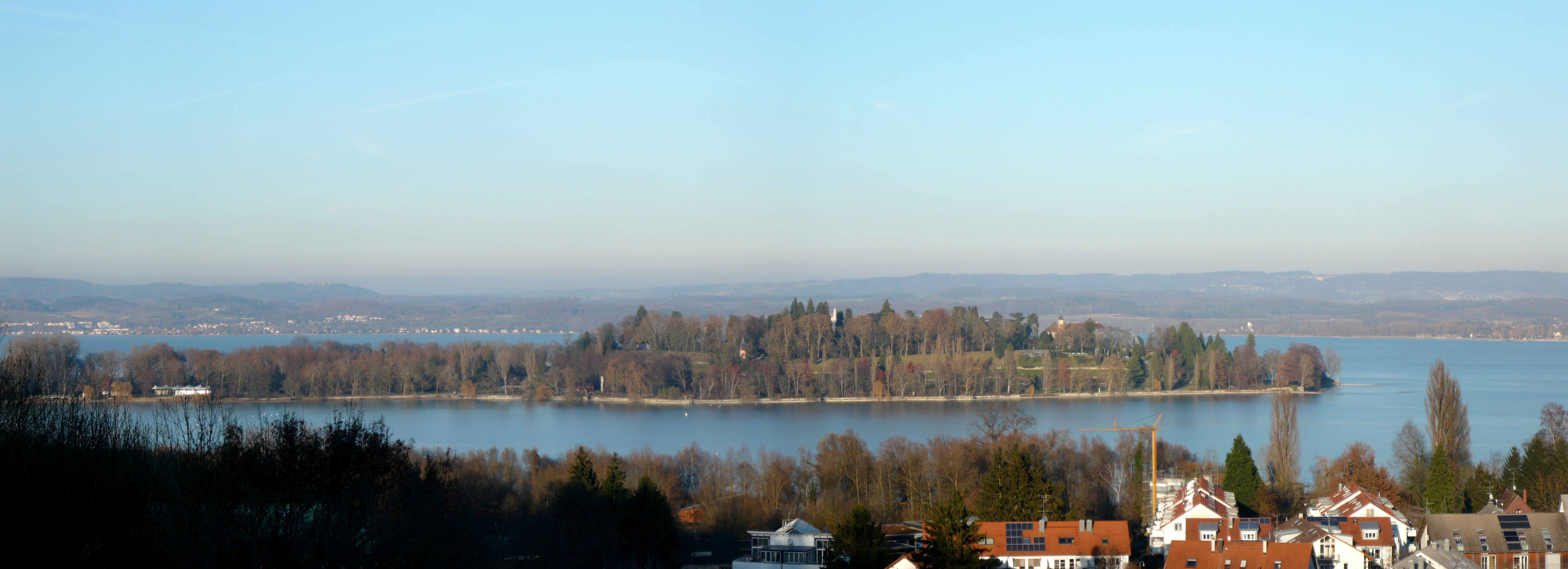 Mainau island in Bodensee